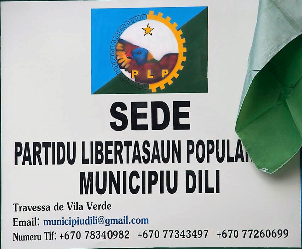 Sitz der Partidu Libertasaun Popular in Dili